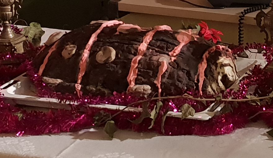 Reproduction du "kloug" de monsieur Preskovic dans le film "Le père Noël est une ordure" (1982) ; image recadrée de la reconstitution des décors du film Le père Noël est une ordure de l'exposition Génération 80 Experience, à Liège (Belgique)